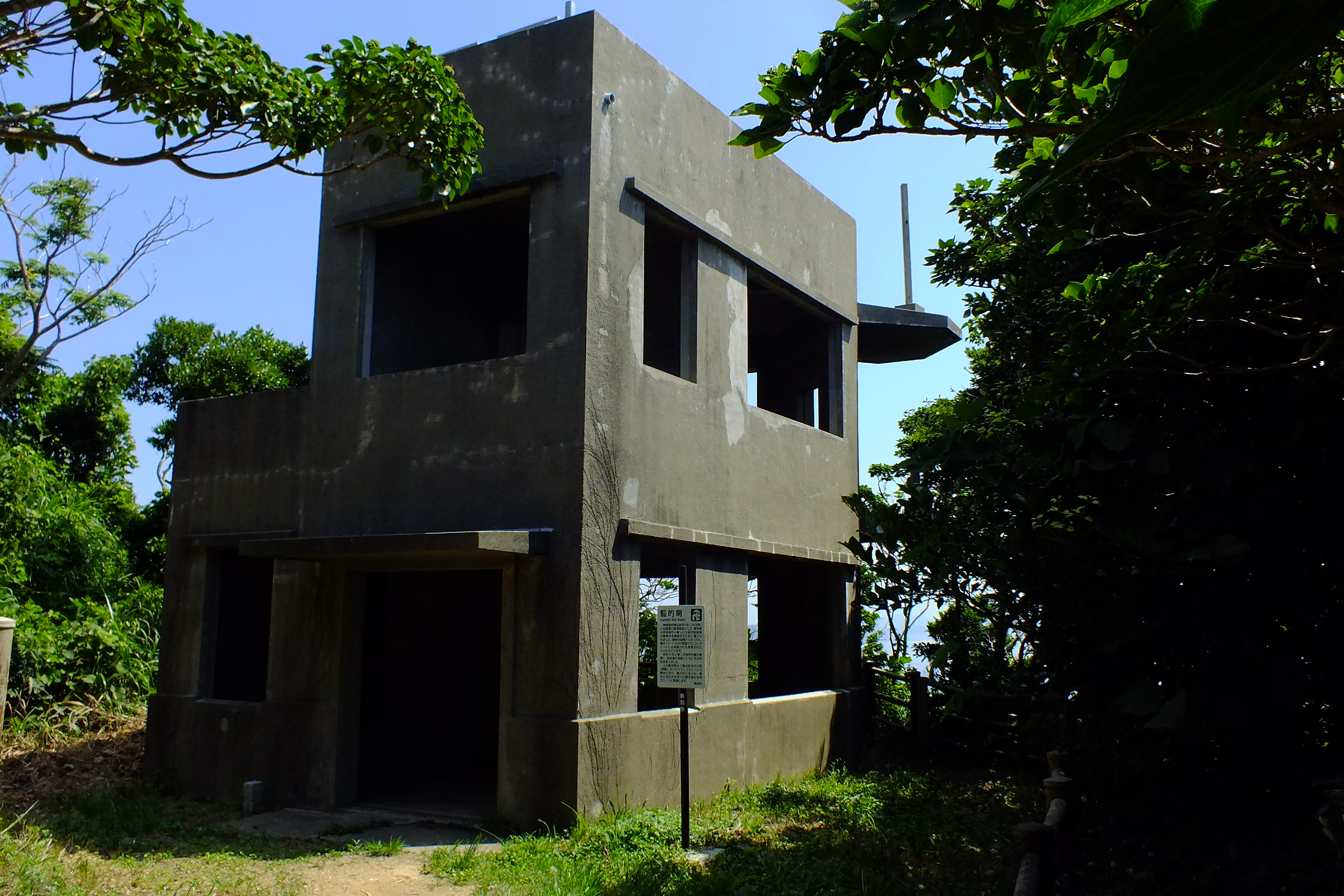 2016-08-05 Kami-shima Island, Kanteki-shô Ruins 神島監的哨跡